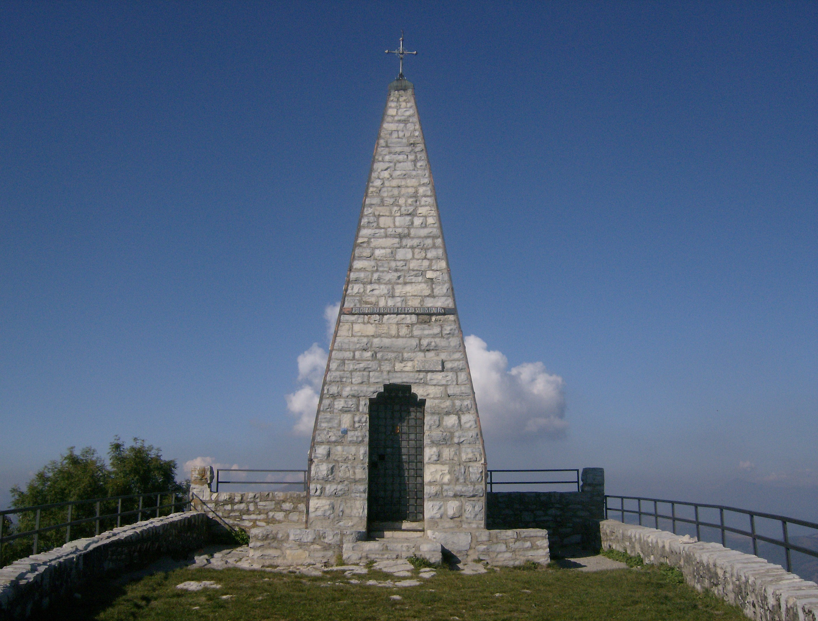 Cappella Monte Palanzone